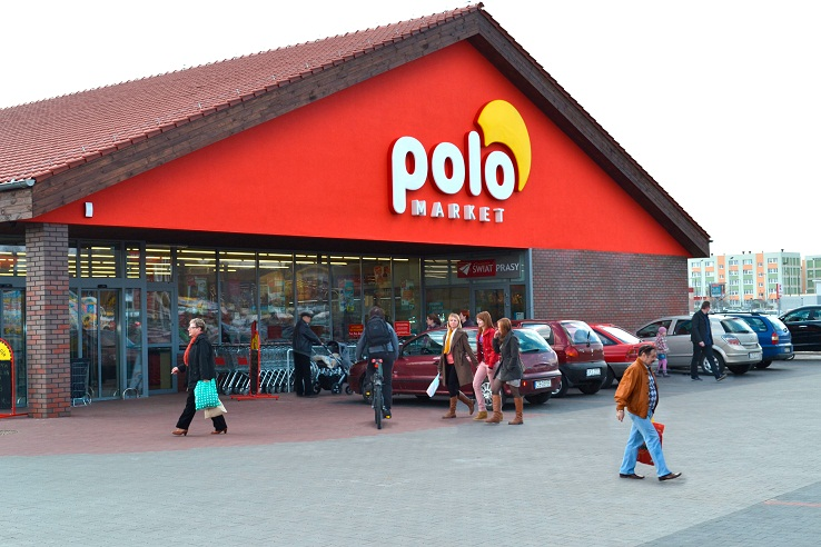 zdjęcie sklepu POLOmarket na bydgoskim Fordonie